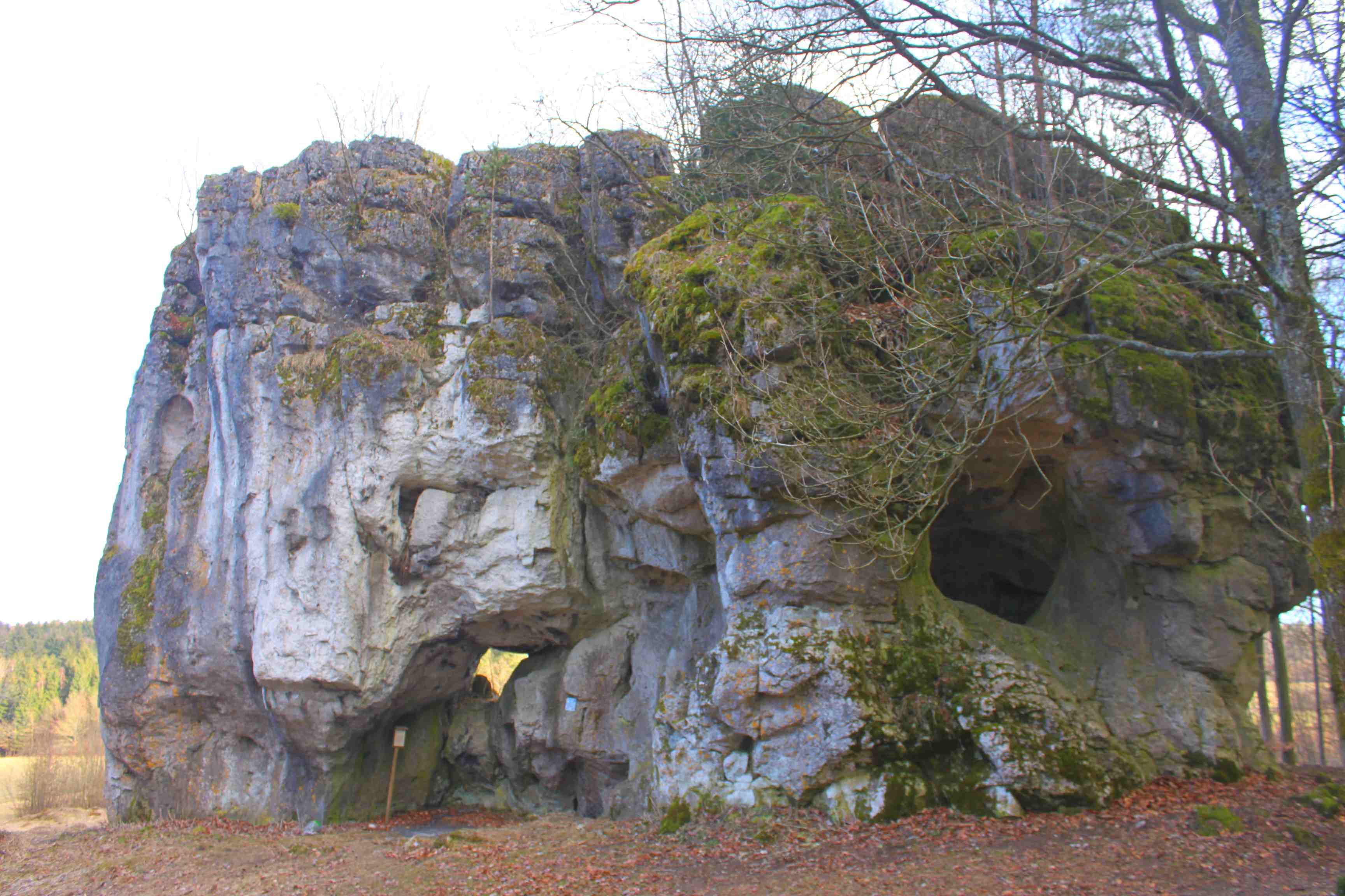 Der Felsturm Hohler Stein liegt bei Schwabthal und ragt über die Hochfläche. Eine Halbhöhle gab ihm seinen Namen